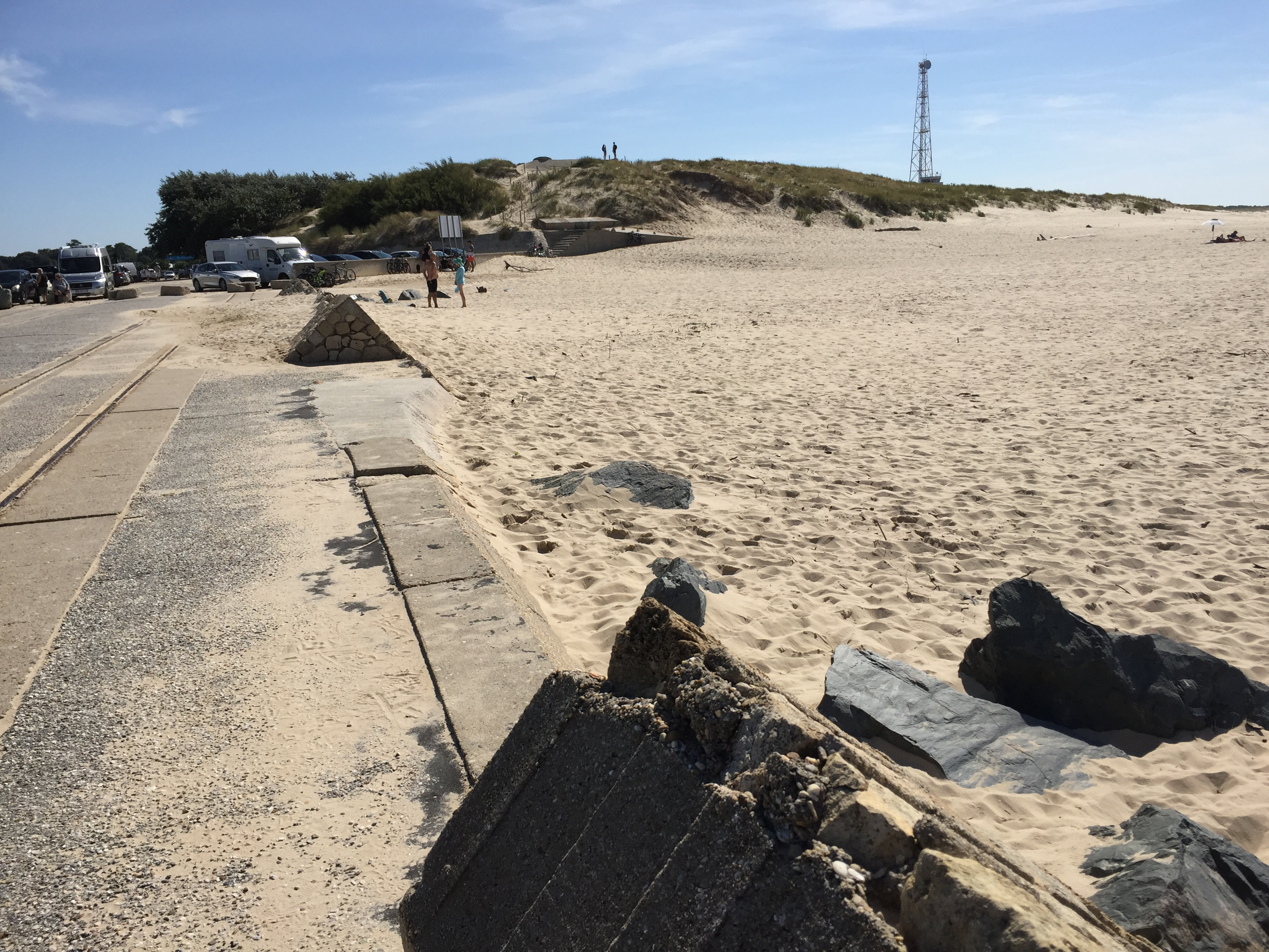 Ensablement du bout de la pointe de Grave